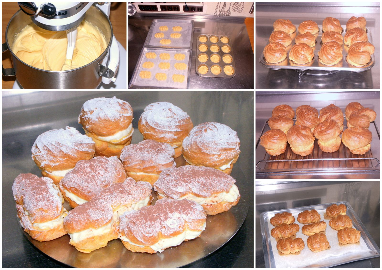 Gebäck aus Brandmasse: Windbeutel („rund“) und Eclairs („länglich“). Die verschiedenen Abbildungen zeigen: – Oben links: Unterrühren von Ei in die erhitzte und leicht abgekühlte Masse mit einer Küchenmaschine. – Oben mitte: Eclairs (links, auf den beiden Backblechen) und Windbeutel (rechts, in Muffin-Backform), jeweils vor dem Backen. – Oben rechts: Windbeutel nach dem Backen, noch in der Backform. – Mitte rechts: Gebackene Windbeutel, noch ohne Füllung. – Unten rechts: Gebackene Eclairs, noch ohne Füllung. – Unten links: Fertige Windbeutel (hinten), jeweils längs quer halbiert, mit geschlagener Sahne gefüllt und nach dem Wiederaufsetzen des Oberteils mit Puderzucker bestäubt; sowie fertige Eclairs (vorne), wie vor halbiert und nach dem Füllen mit Puderzucker bestäubt, jedoch mit Puddingcreme gefüllt.